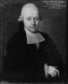 Christian Friedrich Rösler, Öl auf Leinwand, 68 × 53 cm, Professorengalerie Tübingen